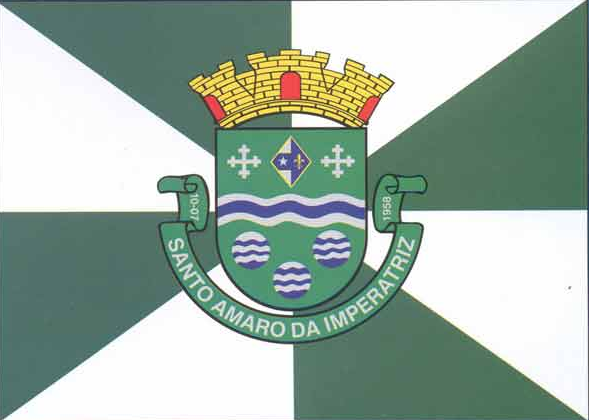 Bandeira do Município de Santo Amaro da Imperatriz, Estado de Santa Catarina, Brasil.